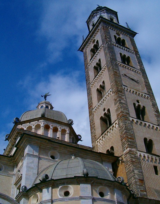 De Madonna di Tirano